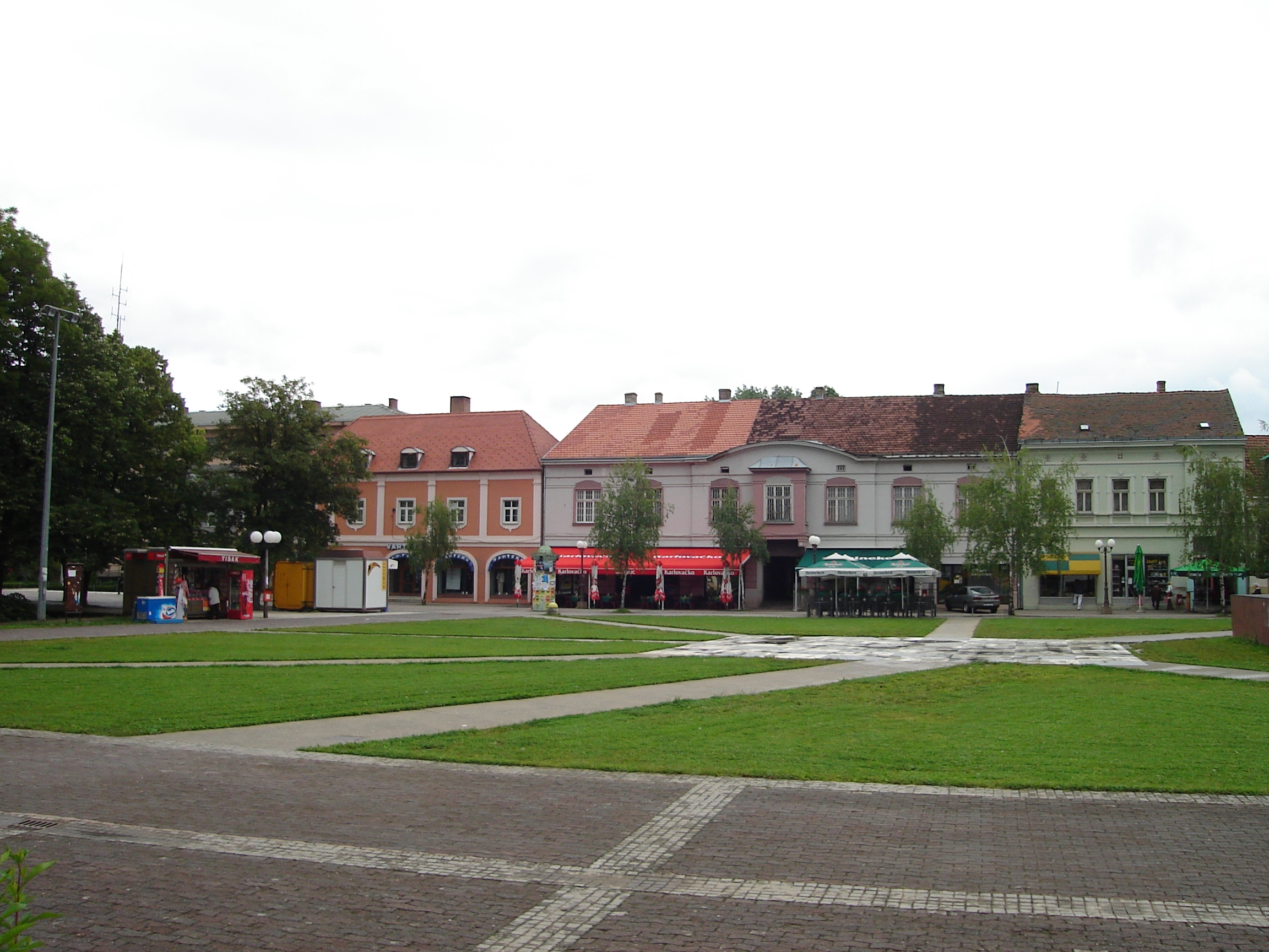 Bild des städtischen Hauptplatzes